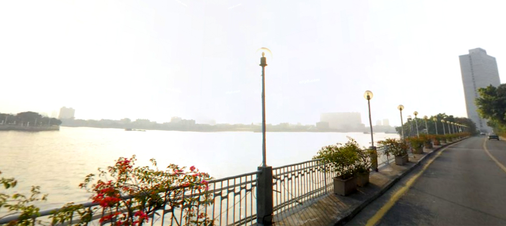 中文（中国大陆）: 白鹅潭全景